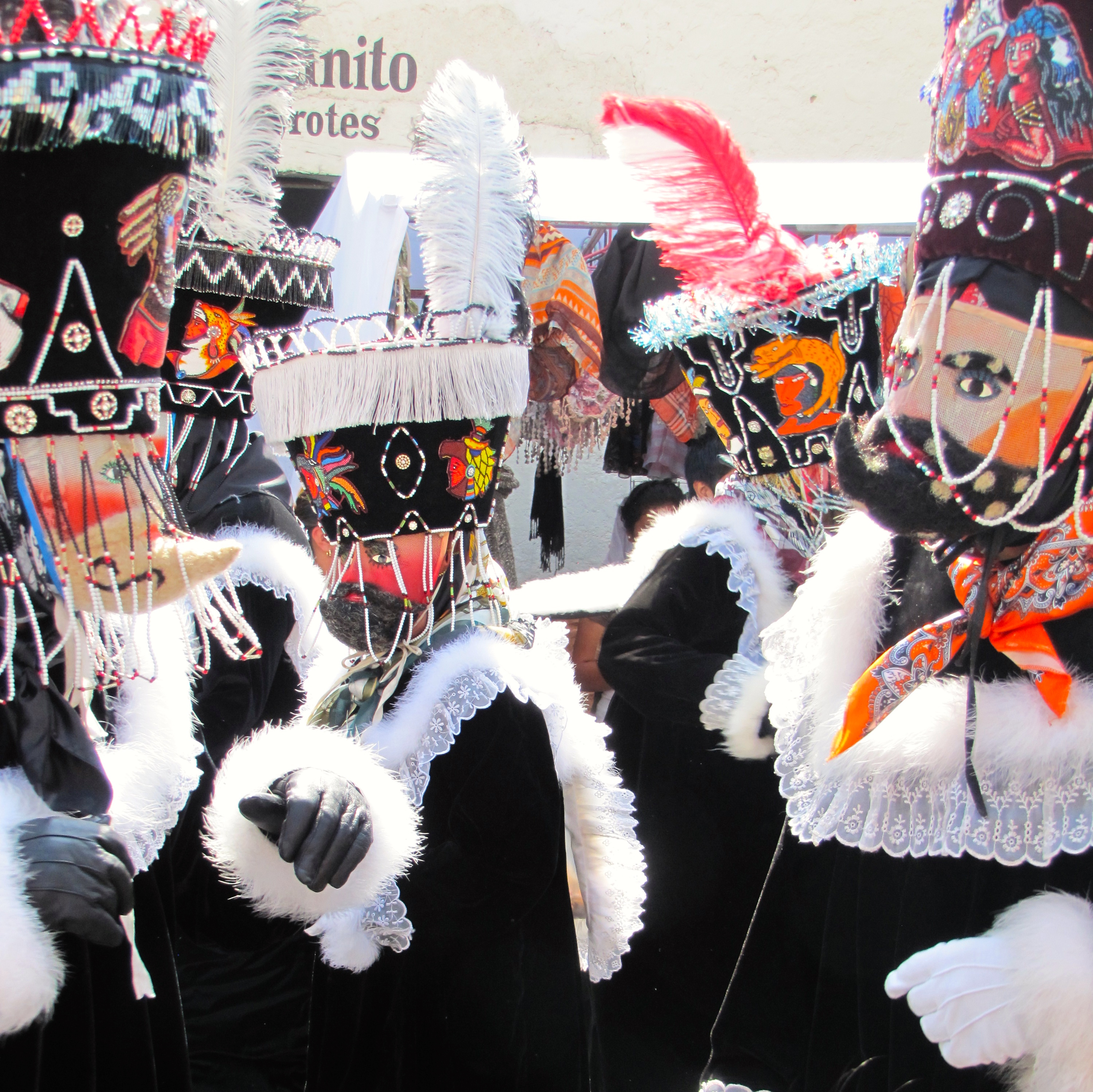 El disfraz de chinelo consiste en una máscara, un sombrero y una túnica de terciopelo negra.